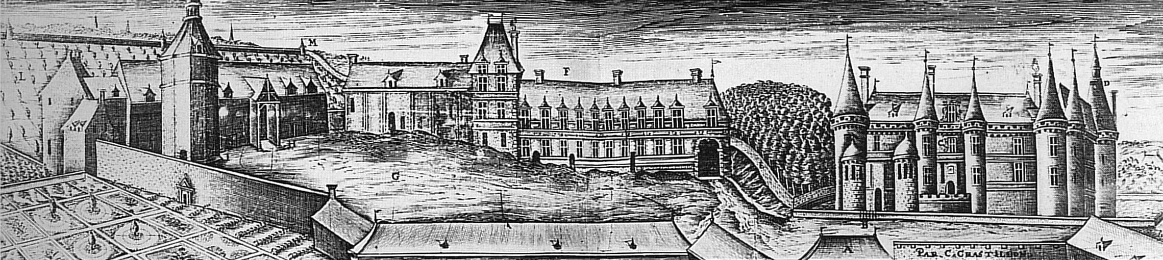 Stich mit der Abbildung des Schlosses Maillebois